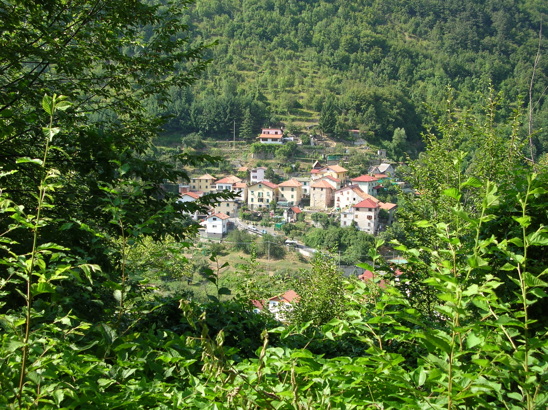 Valbrevenna (prov. Genova), loc. Carsassìna Foto propria Agosto 2008